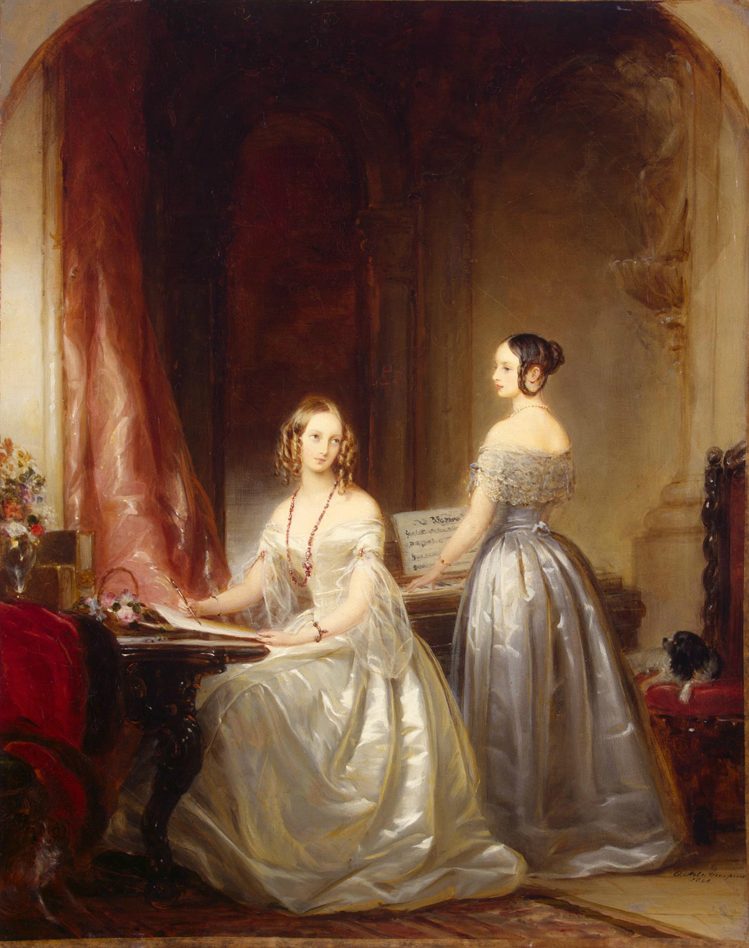 Во время пребывания в России шотландской художницы К. Робертсон ее основными заказчиками были члены семьи императора Николая I. В 1841 г. за большие (в рост) портреты императрицы Александры Федоровны и трех ее дочерей художницу избрали почетным вольным общинником санкт-петербургской Академии Художеств. По характеру своего дарования К. Робертсон была миниатюристкой: она умела тонко выписать лицо, передать фактуру тканей, хрупкость цветов, прозрачность стекла. Эти особенности ее стиля в полной мере проявилось в камерном портрете дочерей Николая I Ольги и Александры. Ольга Николаевна (1822-1892), великая княжна, с 1846 г. супруга Карла Фридриха Александра, принца Вюртембергского, изображена сидящей у клавесина. Рядом стоит Александра Николаевна (1825-1844), великая княжна, с 1843 г. супруга Фридриха Георга Адольфа, принца Гессен-Кассельского. Идеализация и сентиментальность образов позволяли строгим критикам говорить о "льстивой кисти британки". Тем не менее, К. Робертсон оставалась одной из самых популярных и высокооплачиваемых портретисток в 40-е гг. XIX в.